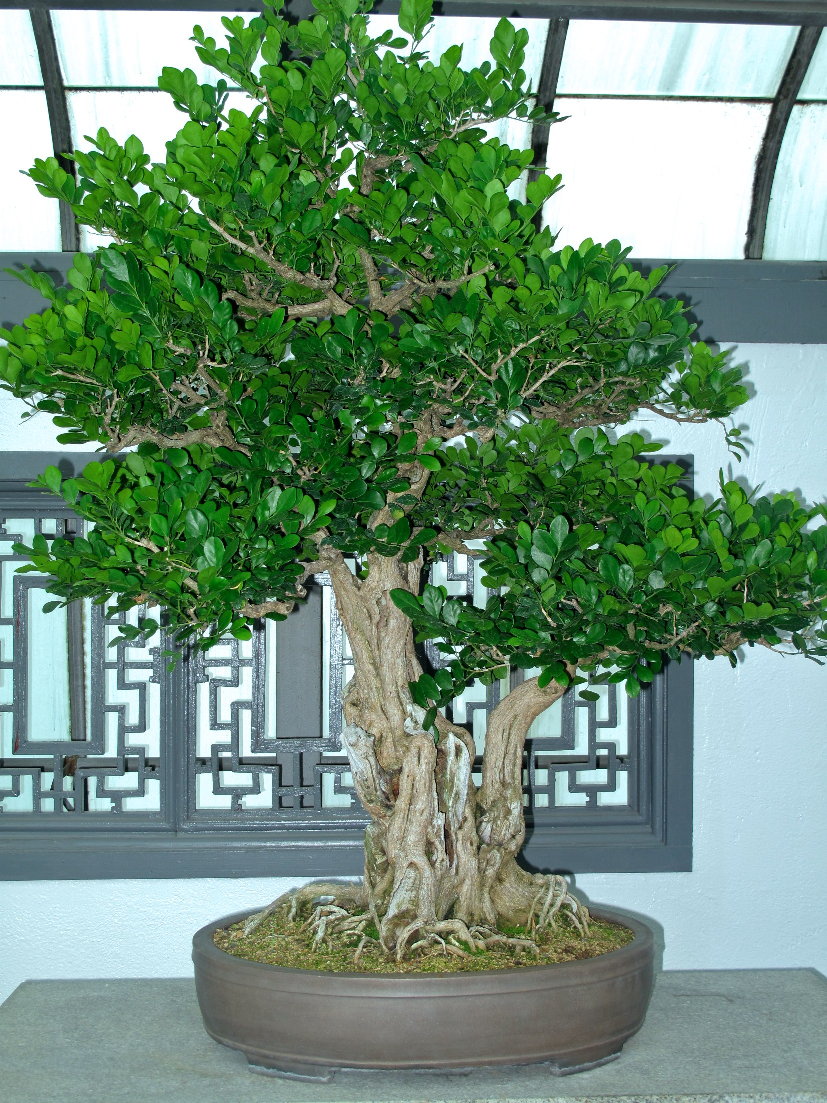 randonnée urbaine 06.10,10 Jardin bontanique